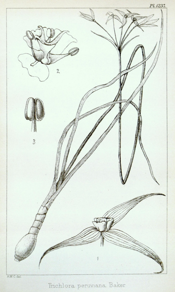 Trichlora peruviana in Hooker's Icones Plantarum, vol. 13., pl. 1237 - London, 1877